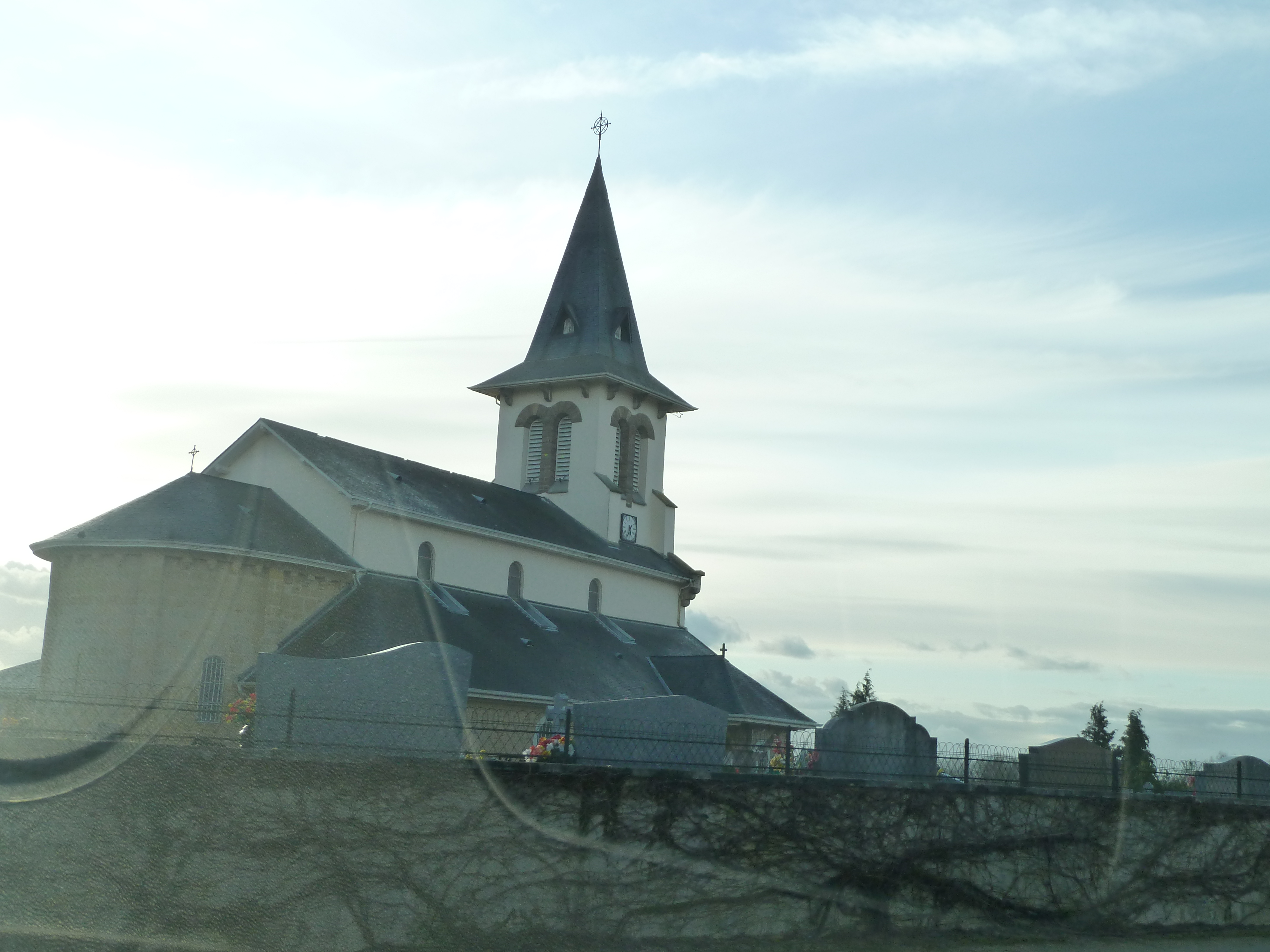 Église de Navailles-Angos